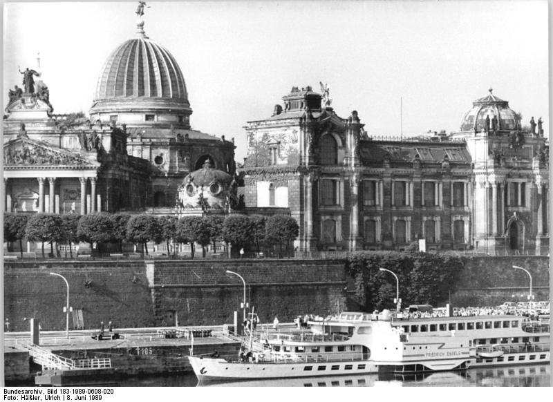 Dresden, Kunstakademie ADN-ZB Häßler 8.6.1989 Dresden: Kunstakademie- Die Dresdner Kunstakademie ist eine der ältesten und traditionsreichsten des Landes. Mit einem Festakt im Hochschulgebäude Brühlsche Terrasse wurde das 225jährige Bestehen der Akademie gewürdigt.